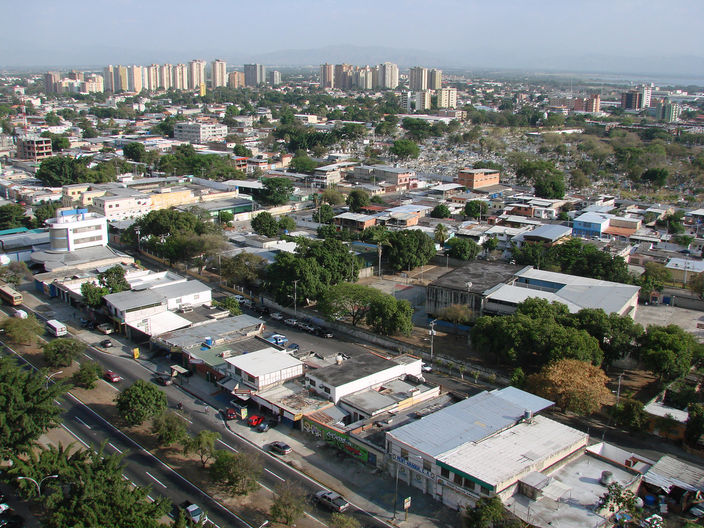 Panorámica del Sur de Maracay. Parte del Lago de Valencia al fondo y a la derecha.